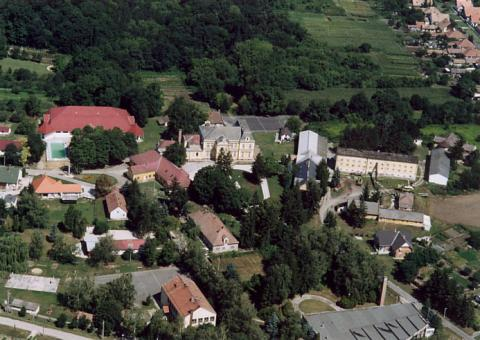 Öreglak, Hungary, aerialphotography